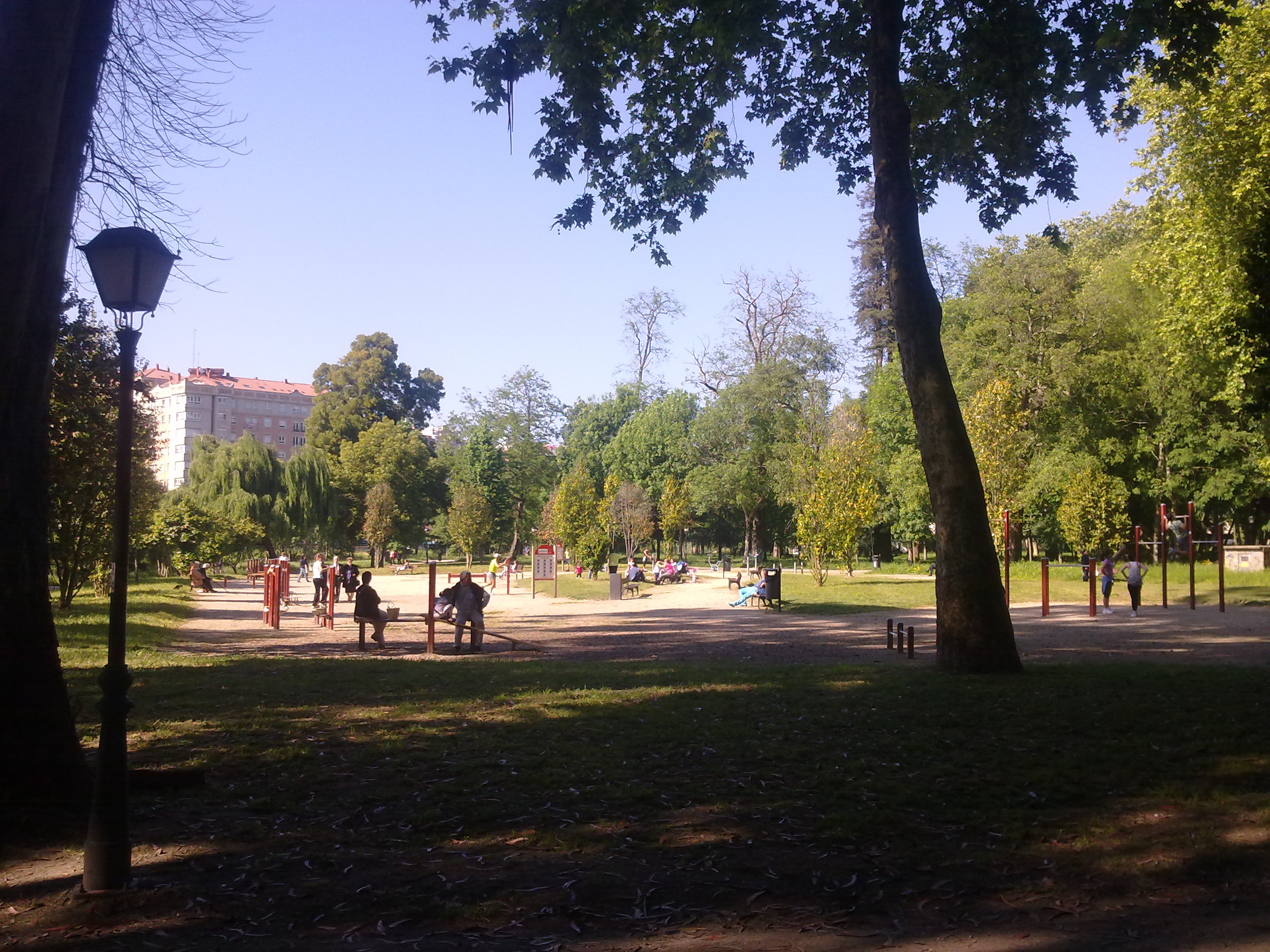 Foto perteneciente al parque Quiñones de León de Vigo, más conocido como parque de Castrelos. En ella se ve a la gente utilizando los aparatos de ejercicio situados en dicho parque.